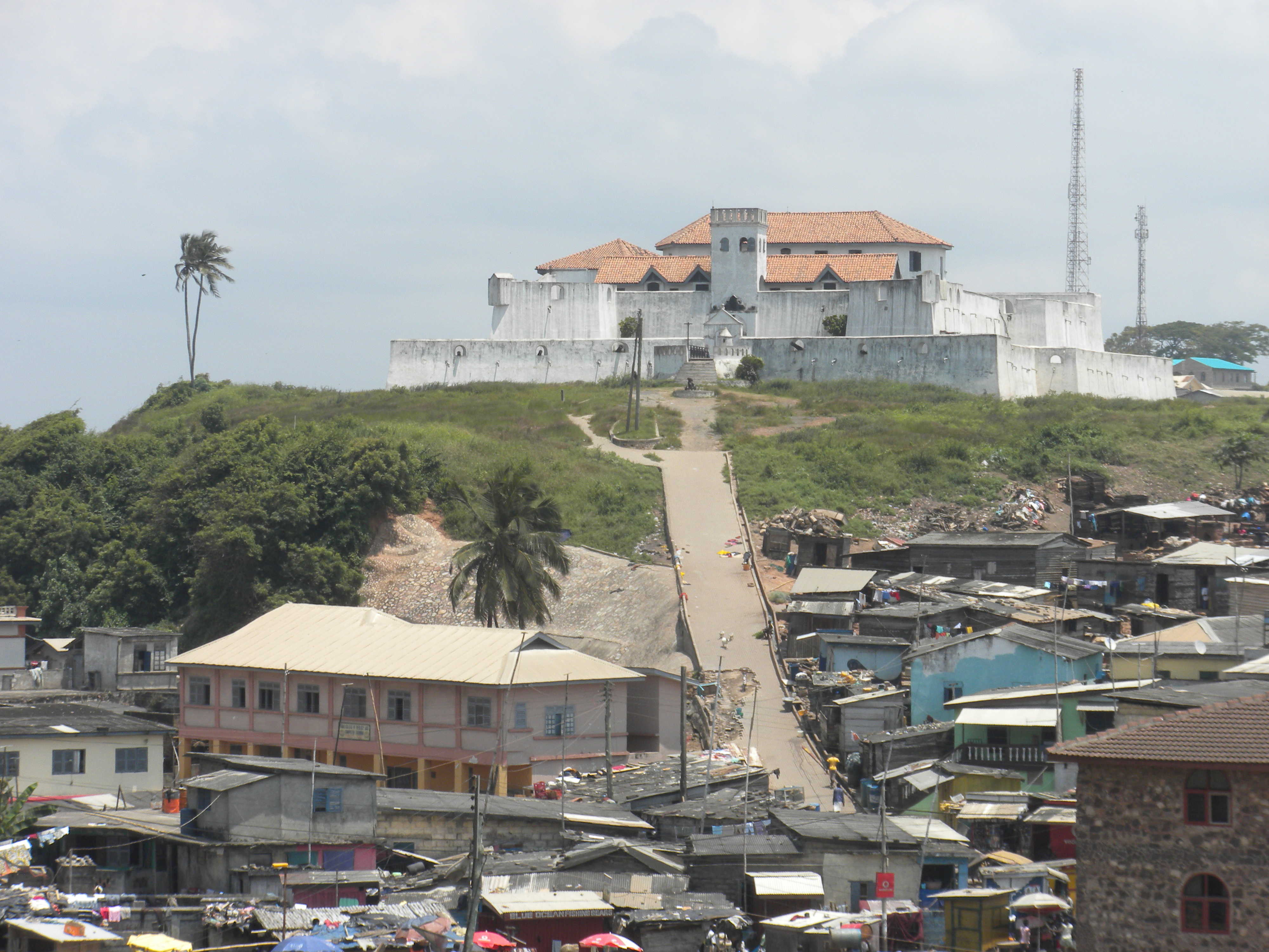 Ghana, Goldküste